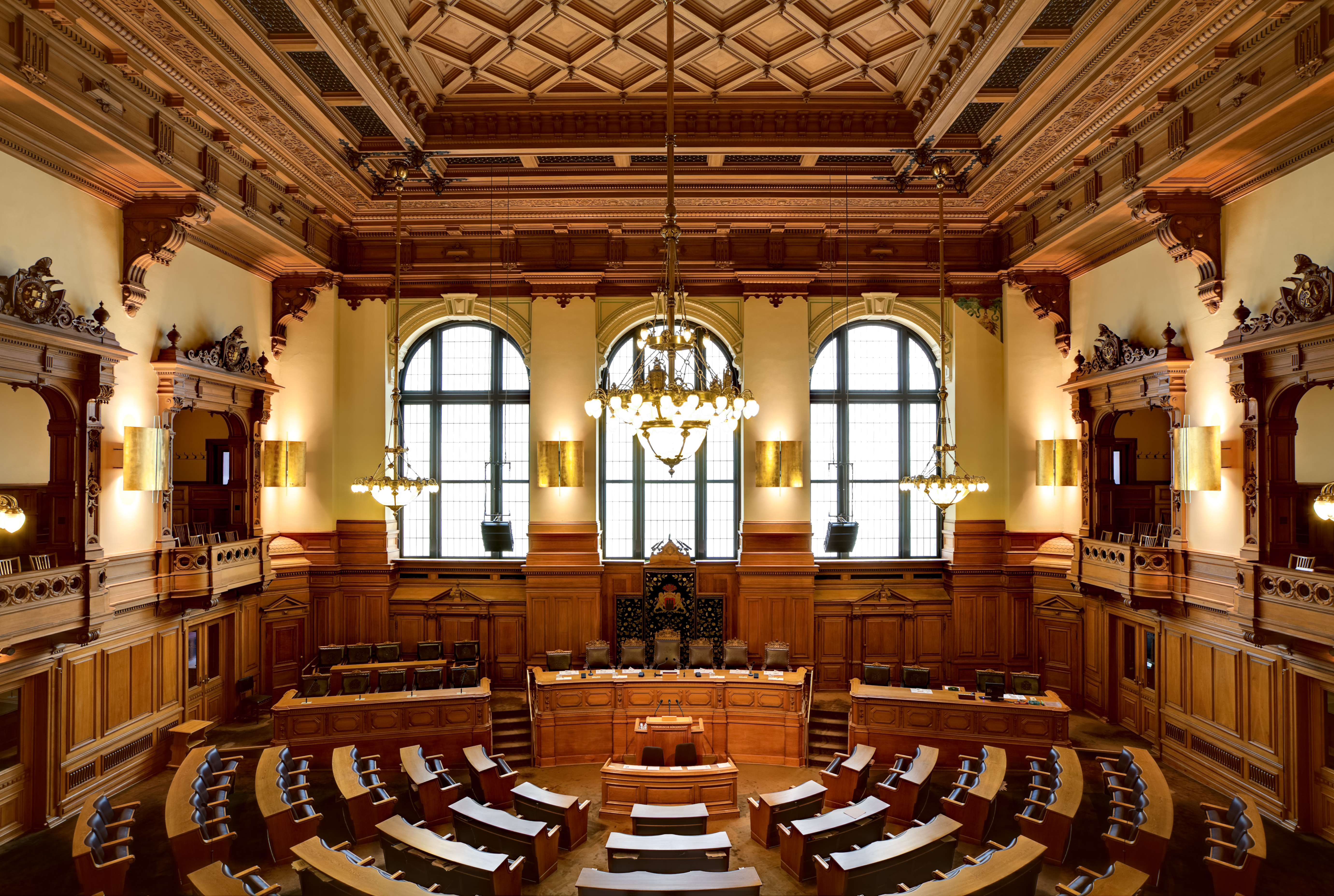 Plenarsaal des Hamburger RathausesThis is a photograph of an architectural monument.